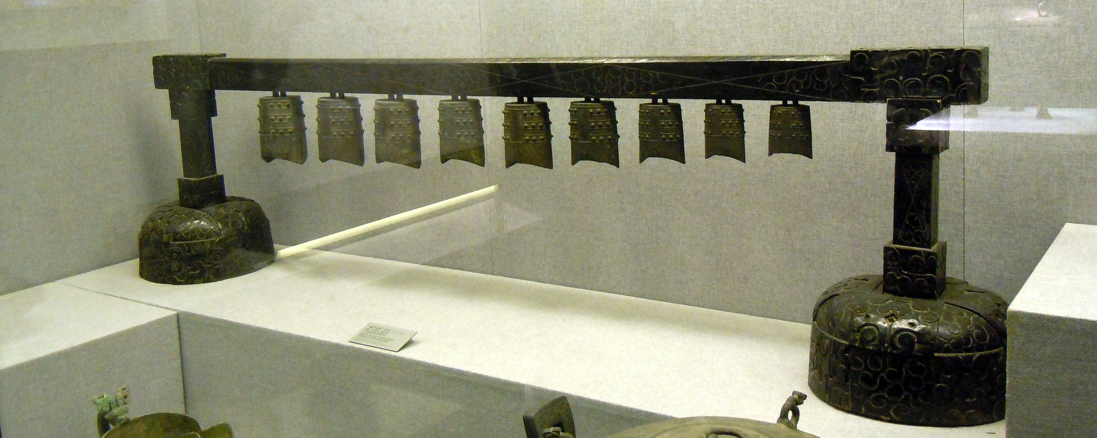 出土于河南省固始县侯古堆一号墓的“番子成周”钮钟